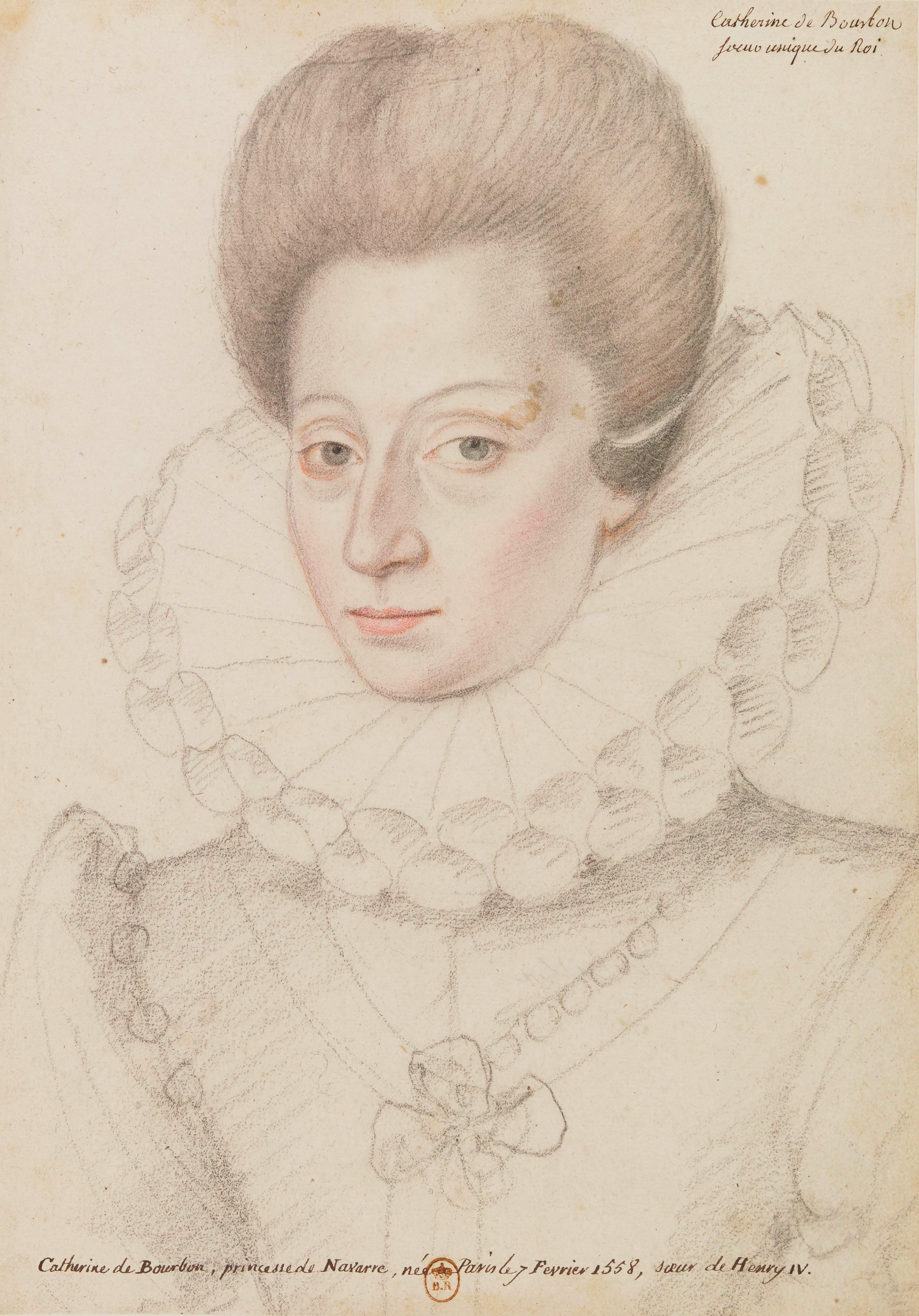 Portrait au crayon de Catherine de Bourbon (1558-1604), princesse de France et de Navarre, duchesse de Bar. Recueil. Portraits dessinés de la Cour de France, Planche 3.